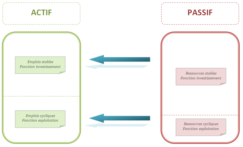 Représentation schématique de l'analyse fonctionnelle